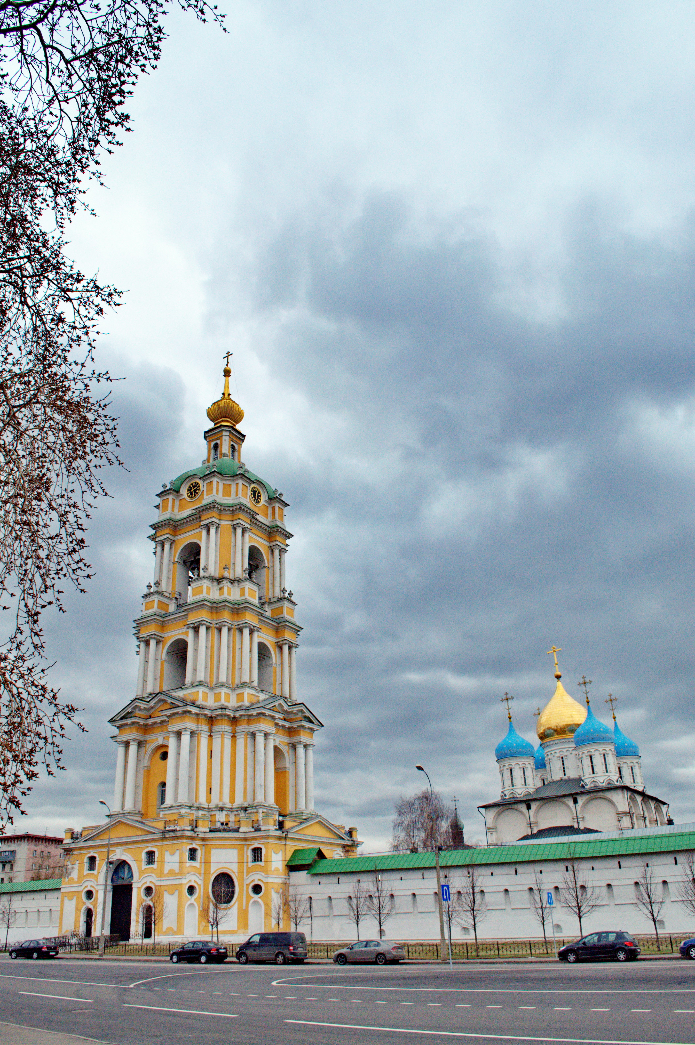 Монастырь Новоспасский (Москва и Московская область, Москва, Крестьянская площадь, 10)